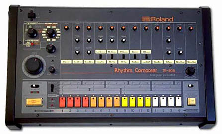 Zelf gemaakte foto